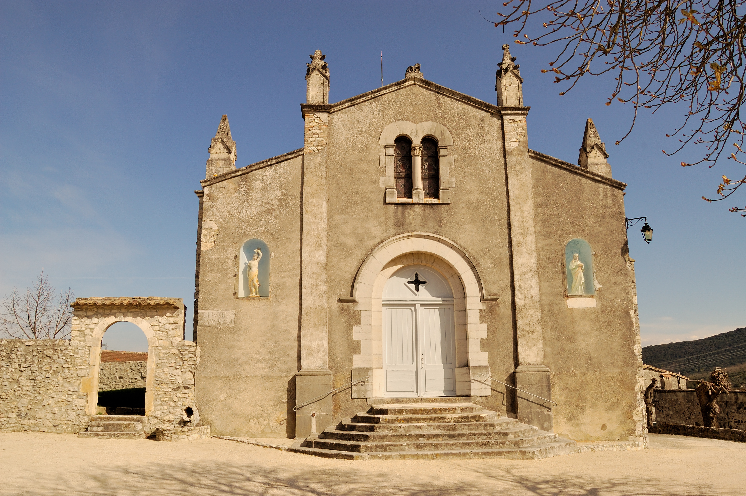 Le parvis de l'église